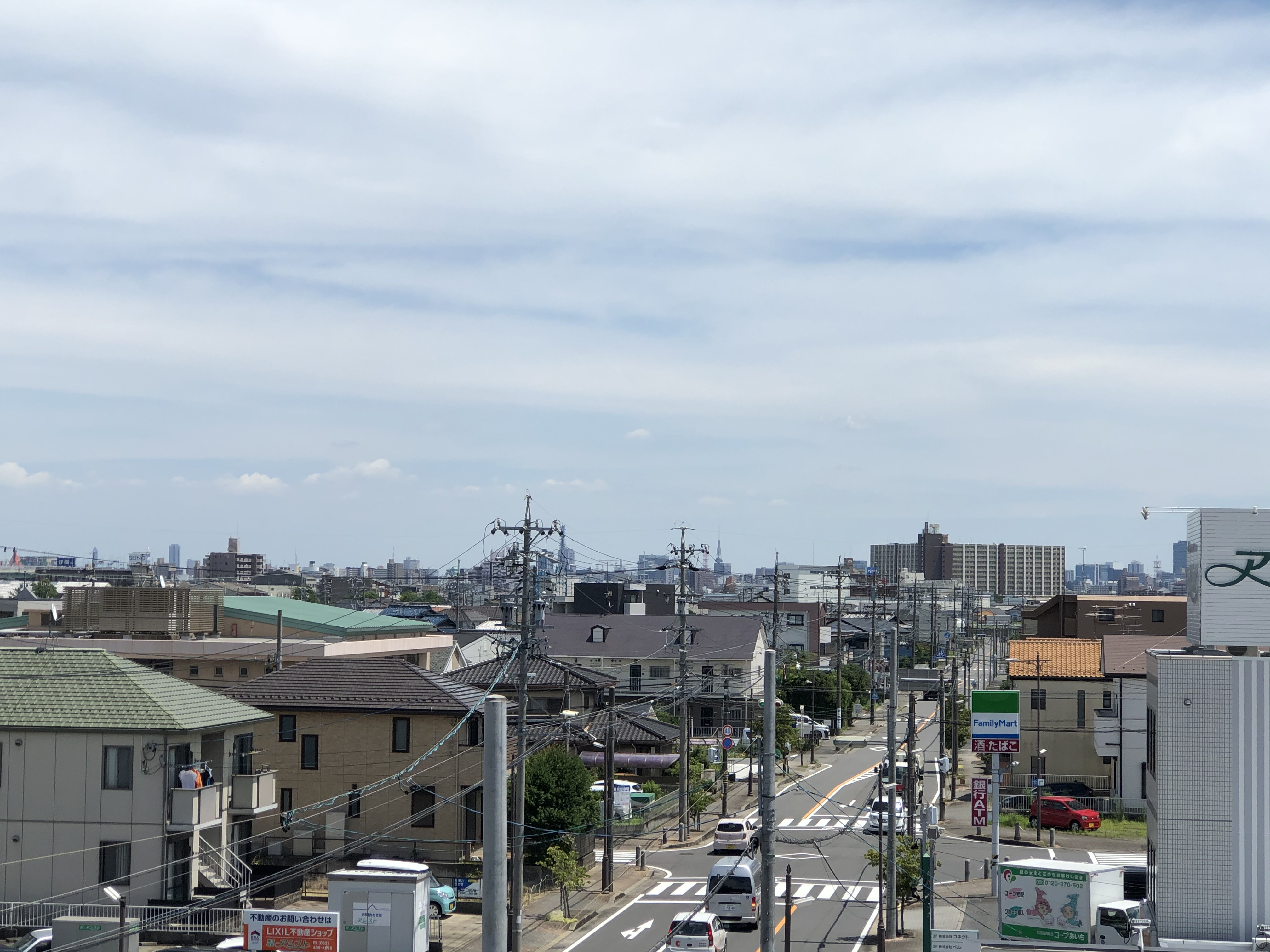 尾張星の宮駅からの景色